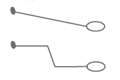 Schema autotransfusní polohy - tzv protišokové Skripta ZDrSEM (